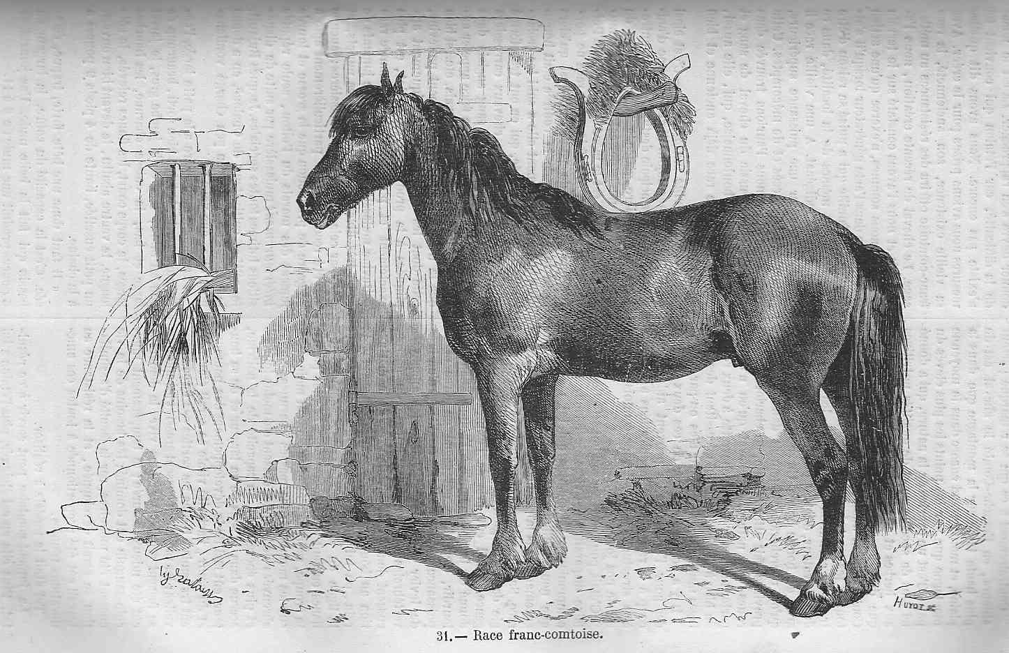 Cheval de race franc-comtoise